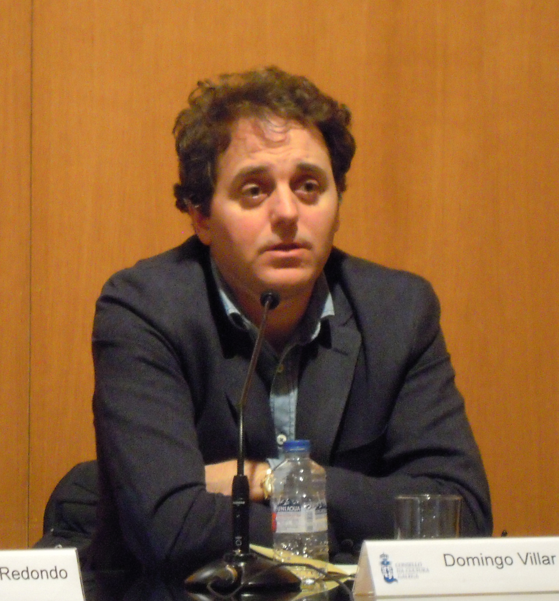 O escritor Domingo Villar na xornada 30 anos de novela negra galega, organizada polo Consello da Cultura Galega